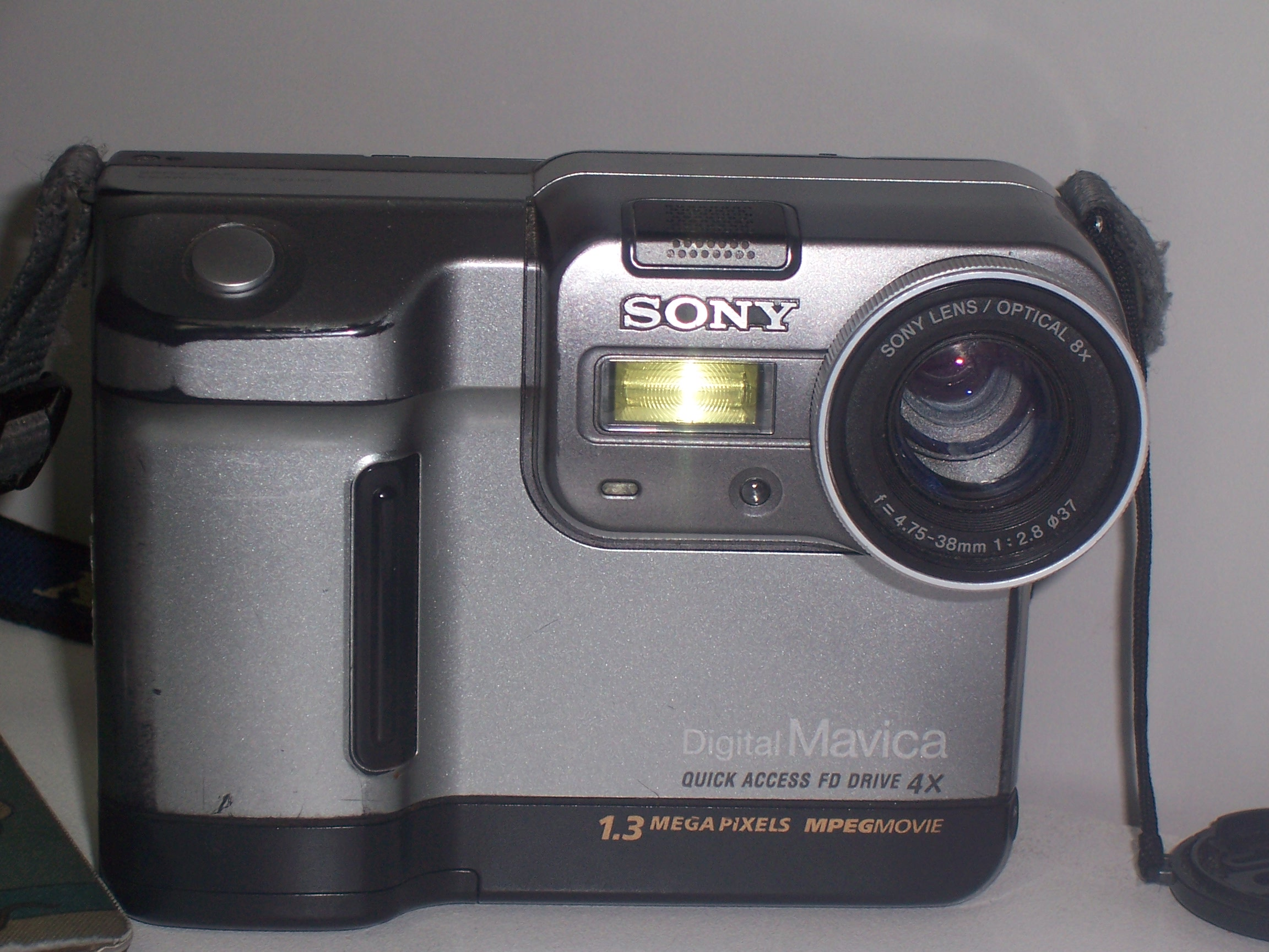 Appareil photographique Sony Mavica MVC-FD88